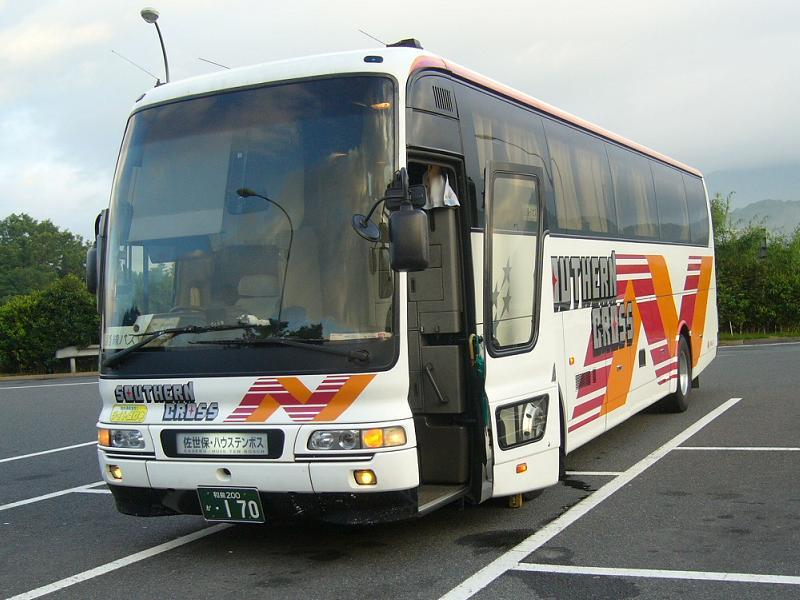 登録番号：和泉200か・170 南海バス堺営業所所属 夜行用車両（各系統で共通運用） 三菱ふそう・エアロクィーン KC-MS822P